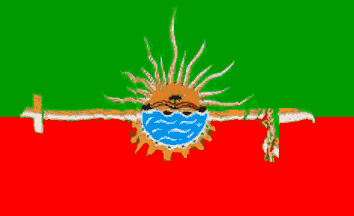 Bandera del Departamento Concordia, Provincia Entre Ríos, Argentina.